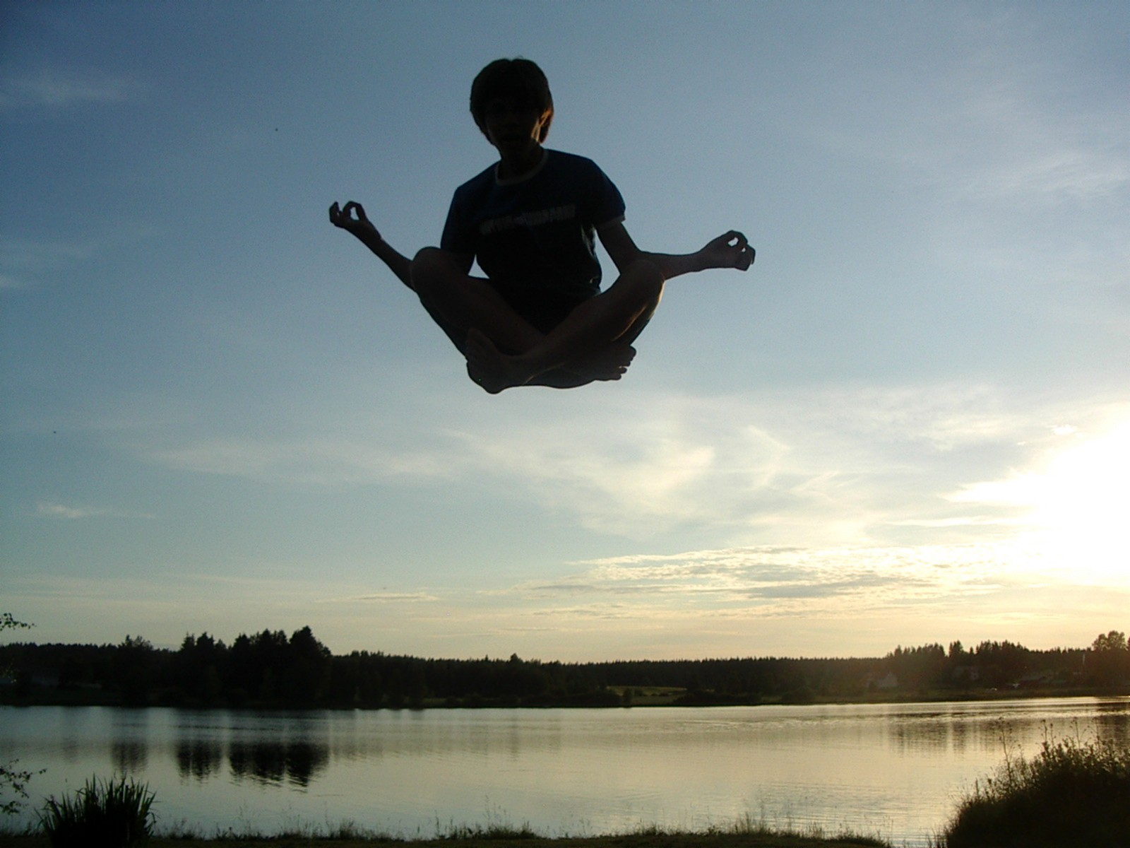 Some levitation? Picture is taken in Haapajärvi, Finland.